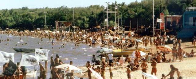 Vista de uno de los sectores del balneario Banco Pelay en la ciudad de Concepción del Uruguay. El mismo cuenta con la playa de río más larga de Sudamérica, de 5 km de longitud. Aquí se realiza anualmente la Fiesta Nacional de la Playa de Río en la República Argentina. La imagen fue tomada y redimensionada de bajo la licencia especificada.